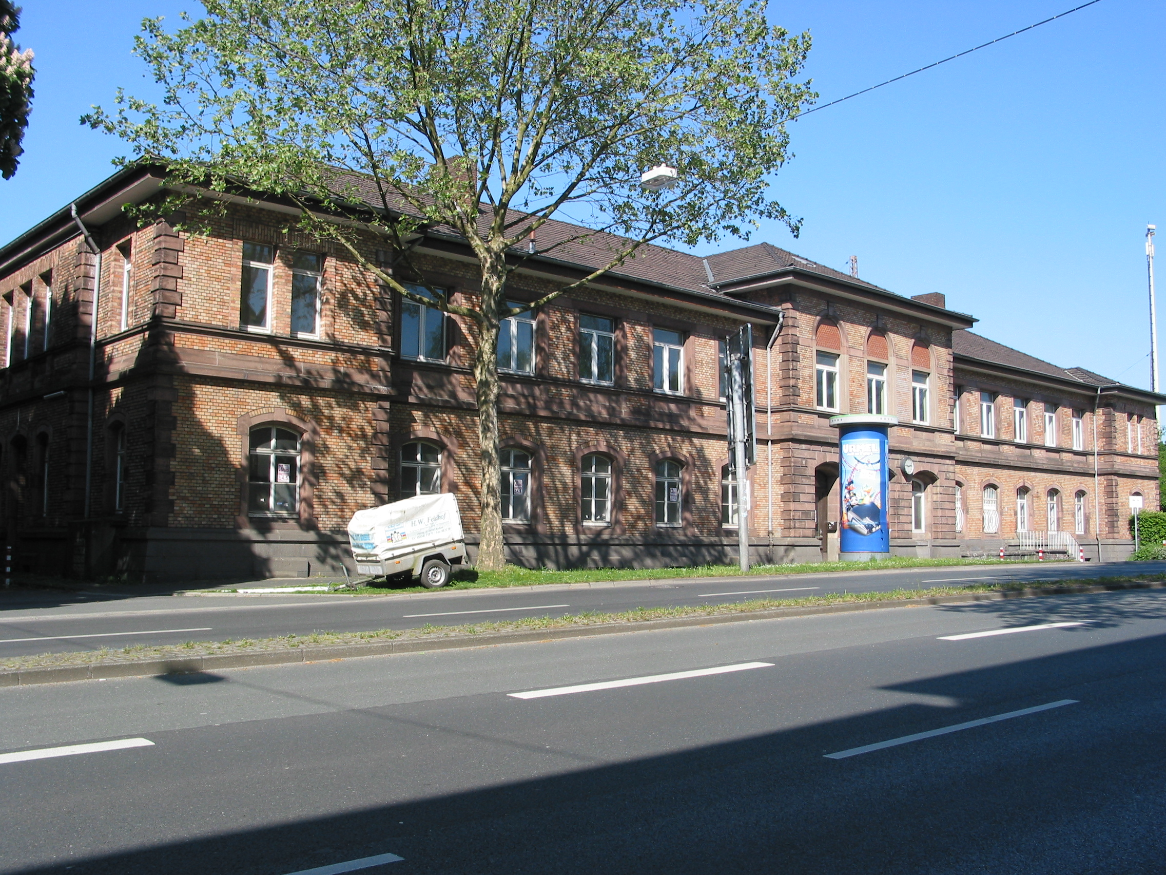 Rheinische Eisenbahn-Gesellschaft, Bahnhof Bochum Nord